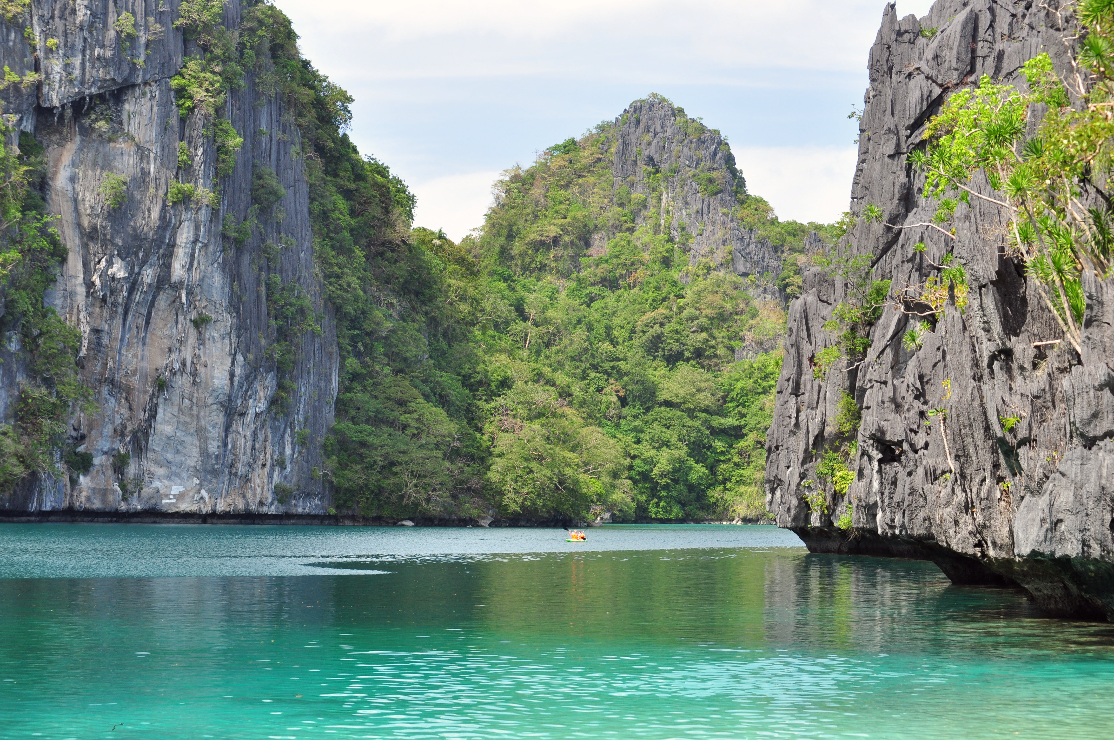 El Nido, Palawan, Philippines